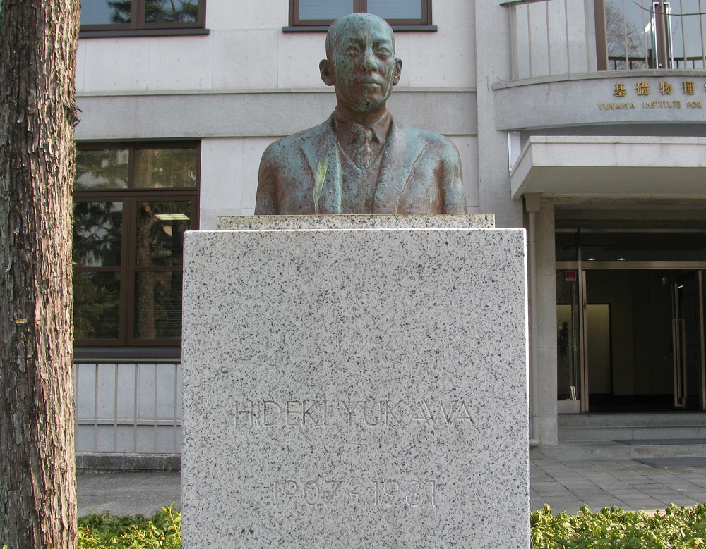 湯川記念館前の湯川秀樹の胸像